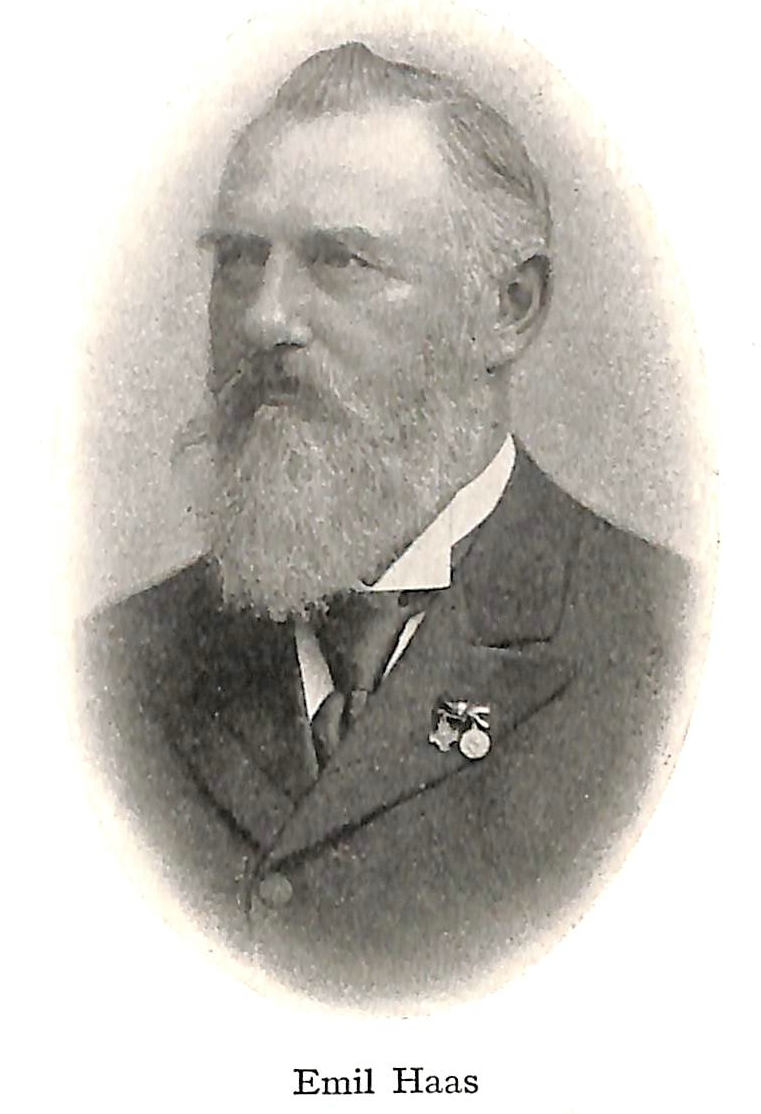 Portrait des Mainzer Ingenieurs und Fabrikant Emil Haas. Er war Mitbegründer der Mainzer Gasmesserfabrik Elster & Cie mit etwa 500 Mitarbeitern im Stammwerk in Mainz. Hauptprodukt war der Haas'sche Patent-Gaszähler von 1878, er funktioniert nach dem Prinzip eines starr begrenzten Messraums für das Messvolumen, das noch heute als Grundprinzip unserer Balgengaszähler Anwendung findet. In allen europäischen Industriestaaten wurden Lizenzen dieses Typs genutzt, die Firma hatte in Luzern und Rotterdam Tochterfirmen.